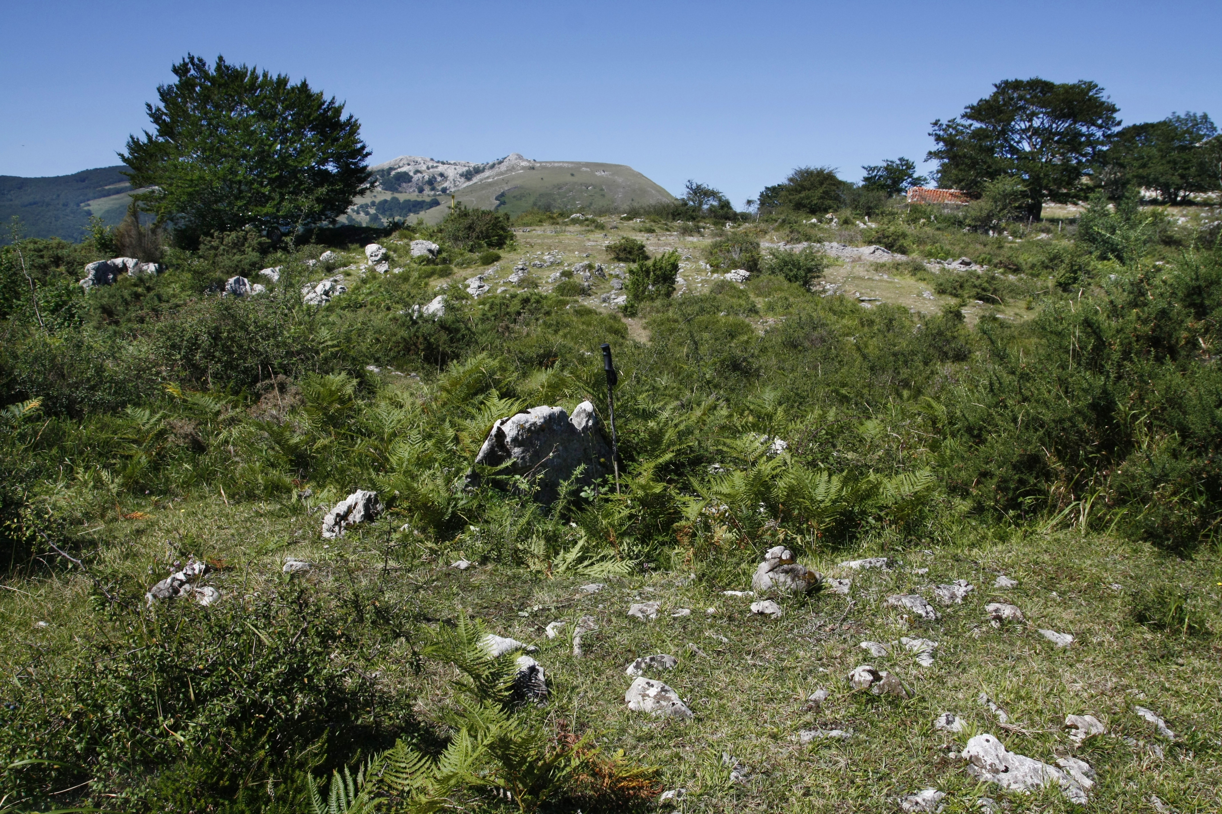 Urtapotolueta I trikuharria